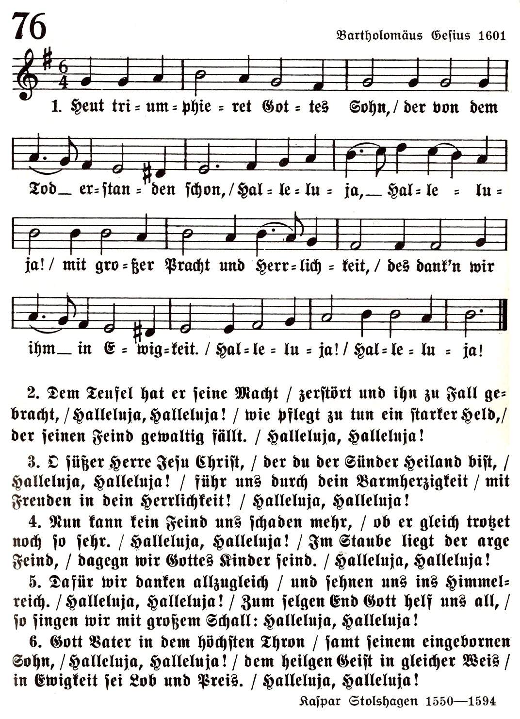 Heut triumphieret Gottes Sohn bei Otto Riethmüller (1932)